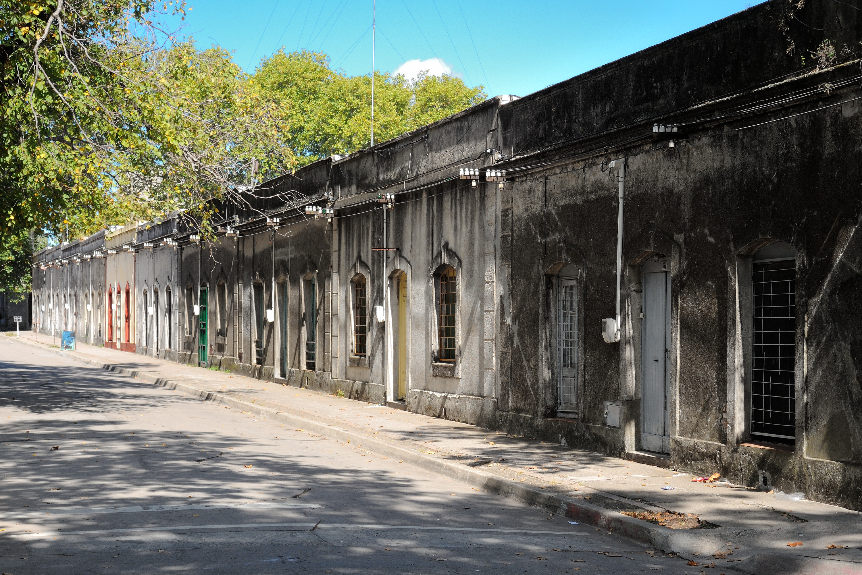 Casas de operarios de los talleres, construidas por la empresa inglesa Ferro Carril Central del Uruguay (FCCU), fundada en 1876, barrio Peñarol, Montevideo, Uruguay